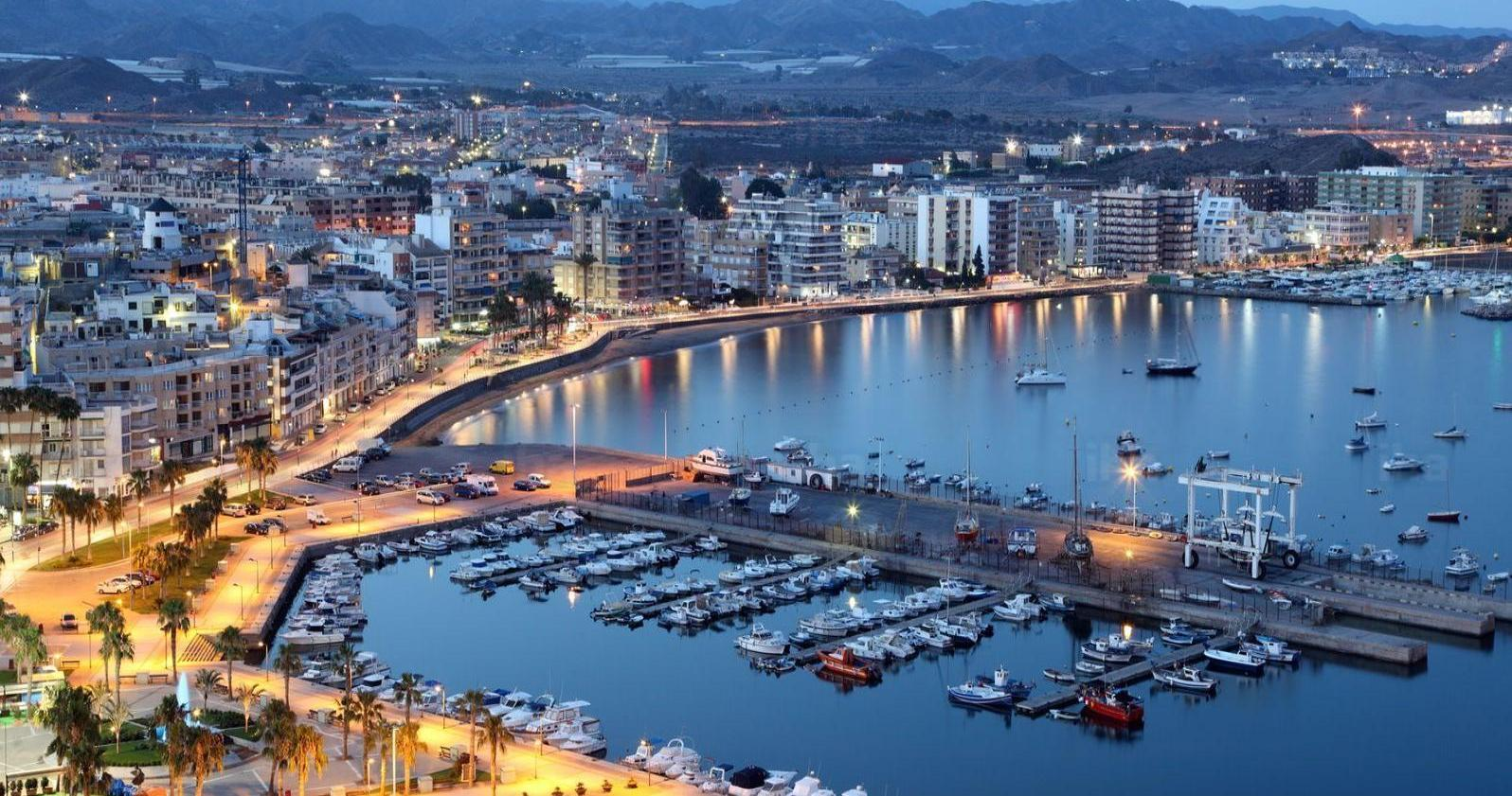 Àguiles de nit